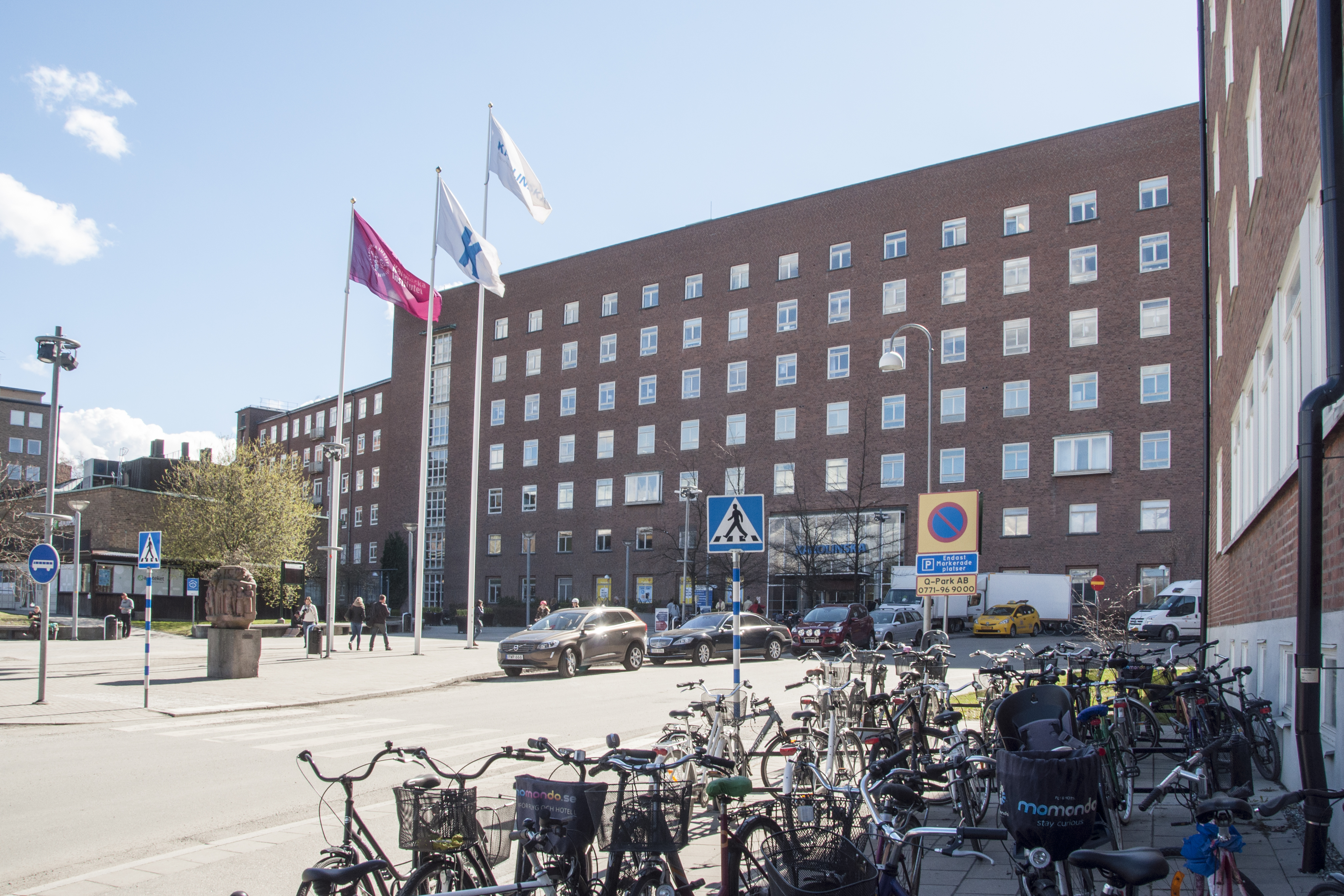 Karolinska Solna, huvudentré. Uppförd 1935-36, arkitekt Carl Westman, västra delen uppförd 1936-47 arkitekter Sven Ahlbom